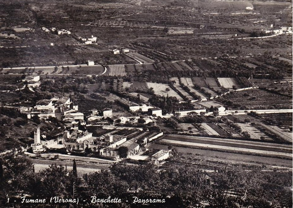 Foto d'epoca di Fumane (provincia di Verona) e della località "Banchette"